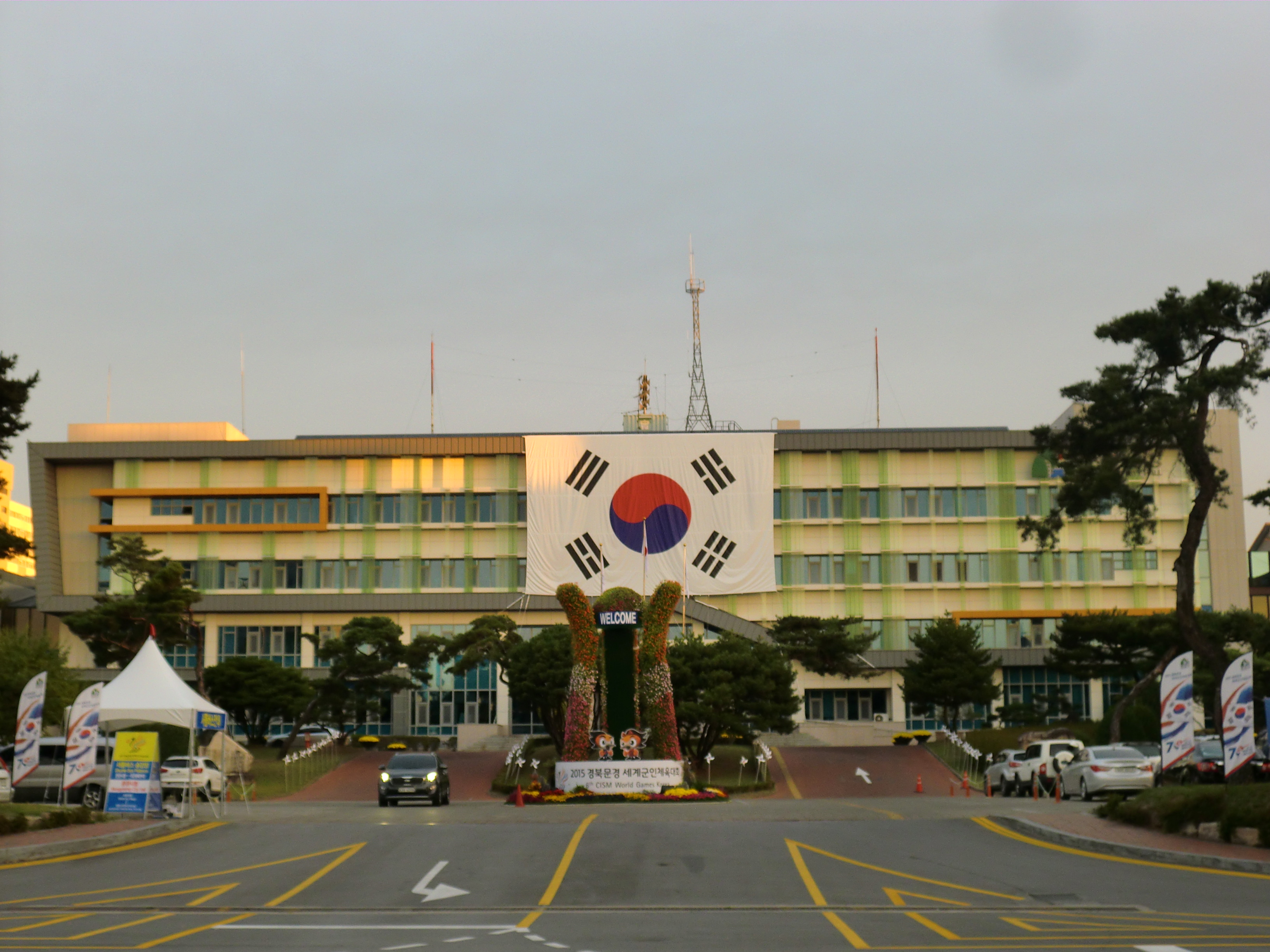 경상북도 문경시에 있는 문경시청